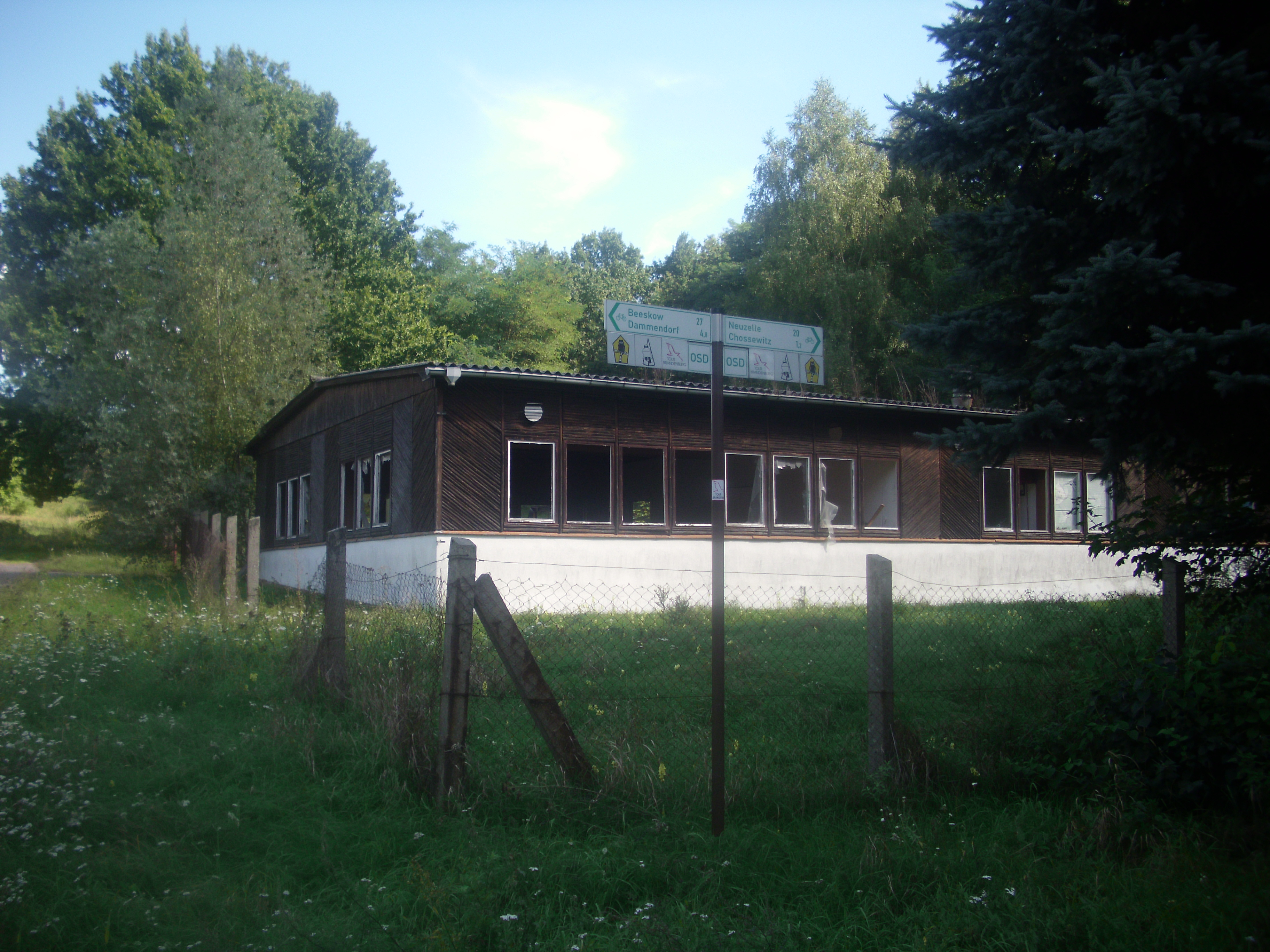 Einzelner Bungalow, Klingemühle, Friedland im Naturpark Schlaubetal, Brandenburg